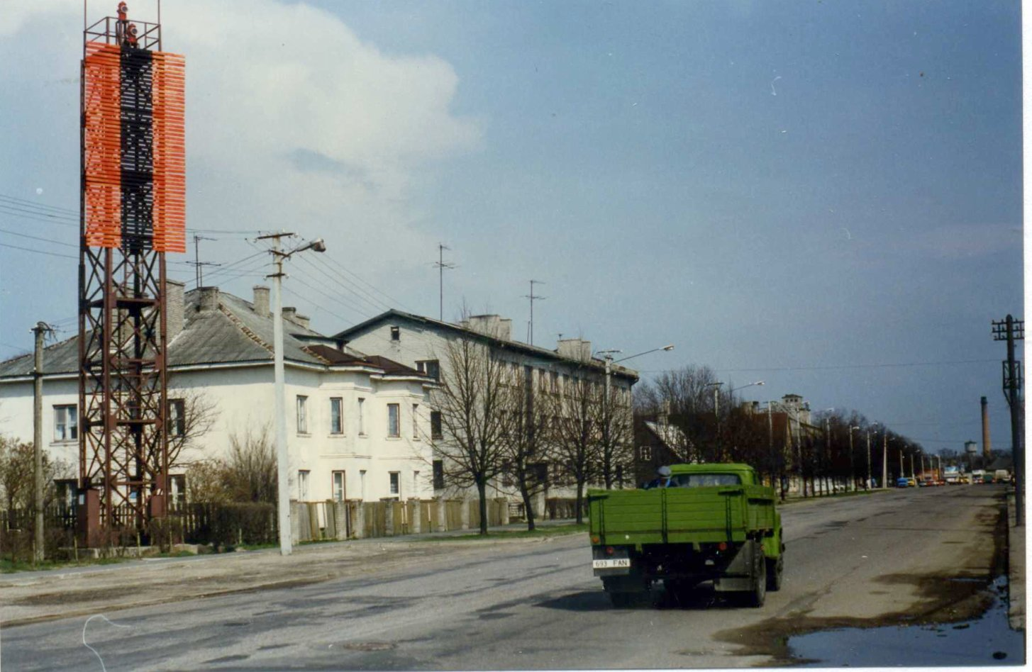 A GAZ-52 truck in Johann Voldemar Jannseni street in Pärnu, Estonia in May 1996.